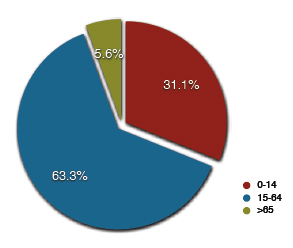 Auteur: Patrick Denizet Santana